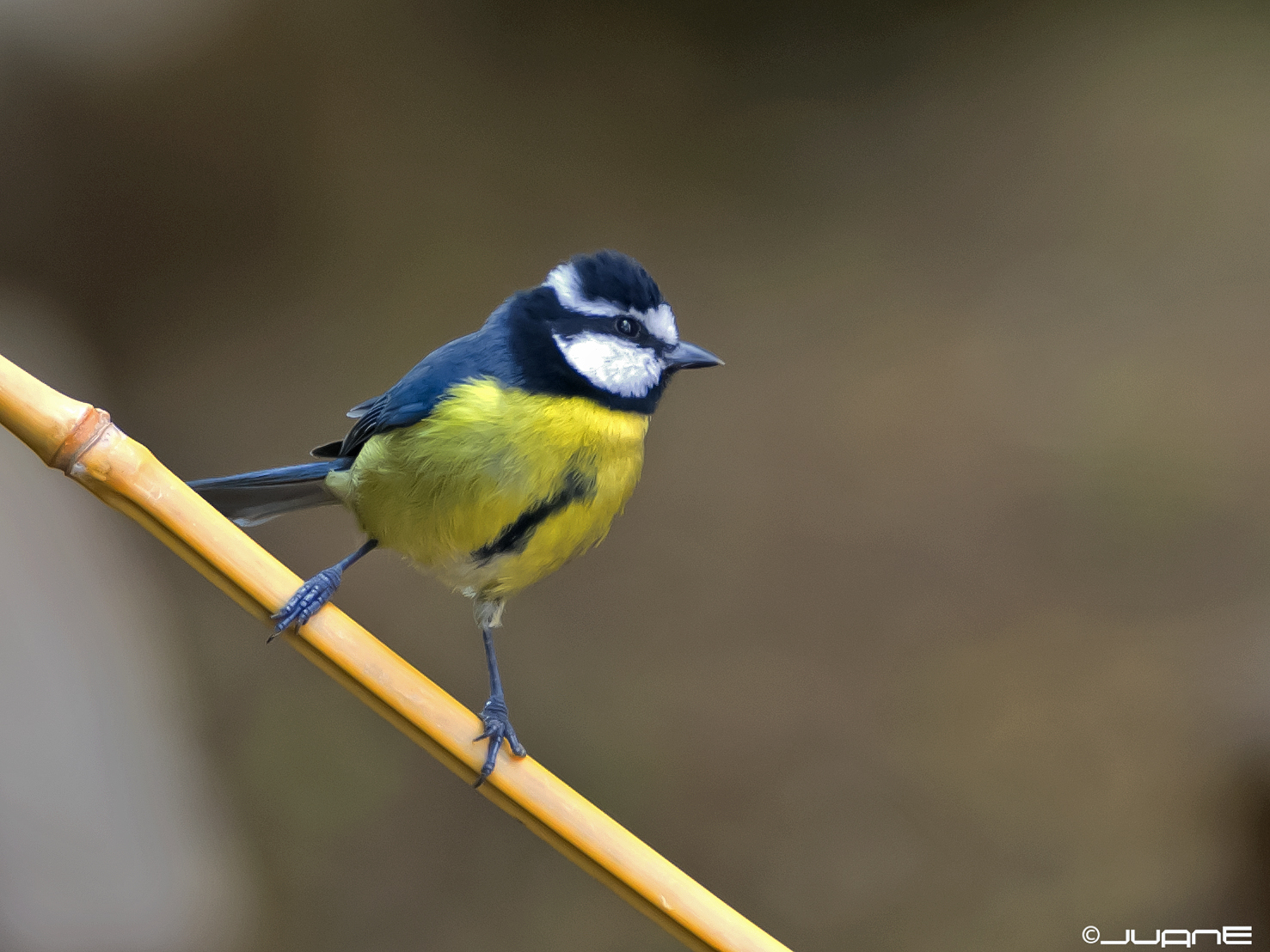 Nikon D300 + Sigma 120-300 f2.8